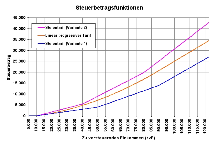 Vergleich der Steuerbetragsfunktionen von zwei Stufentarifen (blau und magenta) mit einem progressiv linearen Tarif (orange). Bei den Stufentarifen sind an den Grenzen zwischen den Tarifstufen leichte Knicke zu erkennen.